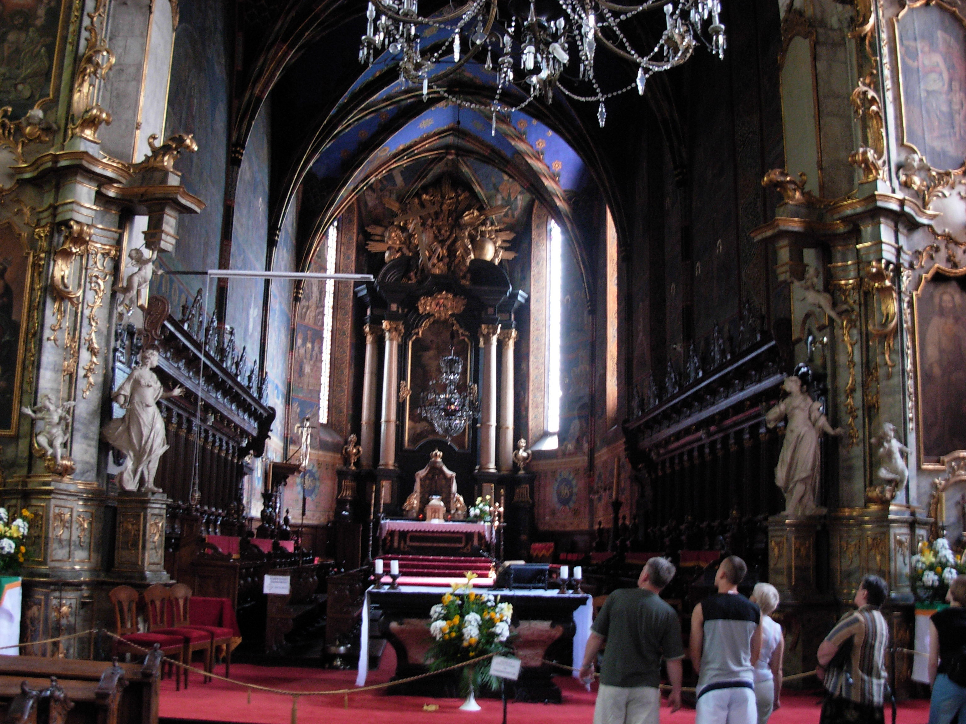 Sandomierz Cathedrali Sandomierz, Poland.